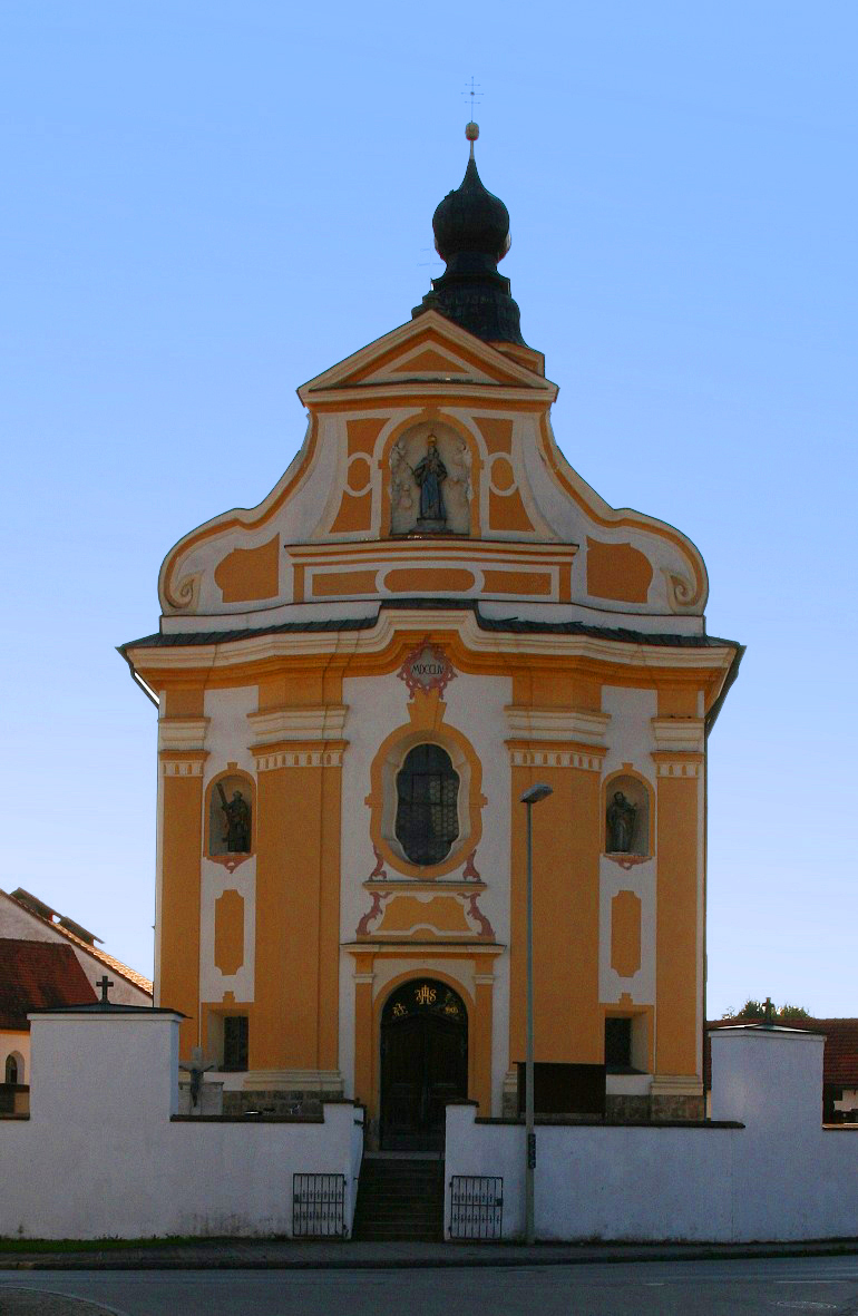 Die katholische Pfarrkirche Peter und Paul in Erharting (Landkreis Mühldorf am Inn, Oberbayer). Ein ansehnlicher Barockbau mit kraftvoller Vorderseite. Der Turm steht auf der Rückseite und schließt mit einer Barockhaube.